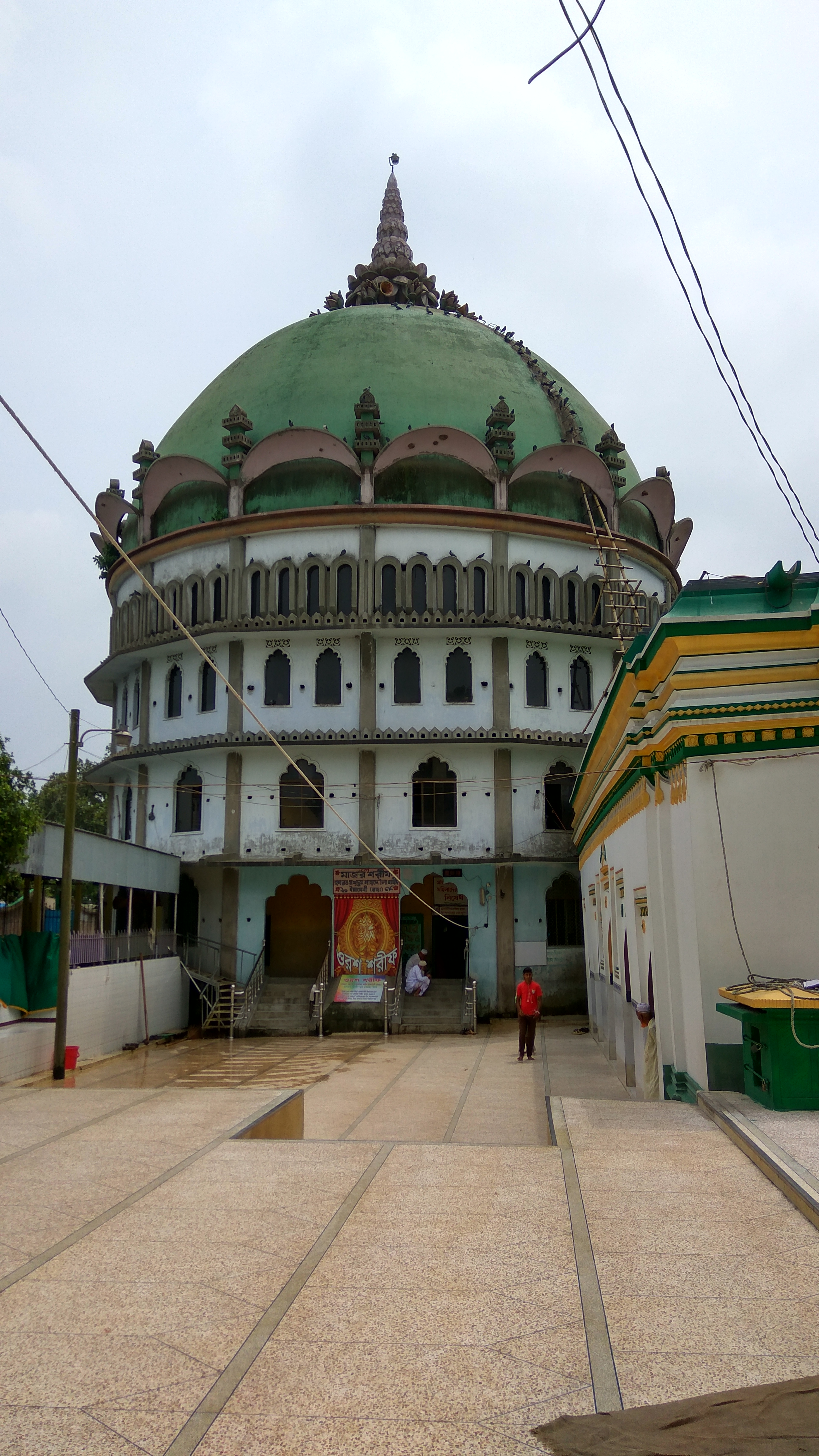 ইয়েমেনের শাহজাদা হযরত মখদুম শাহদৌলা শহীদ ইয়ামেনী (রহঃ) এর নামানুসারে শাহজাদপুর এলাকার নামকরণ করা হয়েছে। কথিত আছে, হযরত মখদুম শাহদৌলা শহীদ ইয়ামেনী (রহঃ) ১১৯২-৯৬ সালের মধ্যে ইয়েমেন থেকে ধর্মপ্রচারার্থে যাত্রা শুরু করে বোখারা শহরে আগমন করেন। বোখারা শহরে হযরত জালাল উদ্দিন বোখারী (রহঃ) এর দরবার শরীফে তার সঙ্গে কিছু সময় অতিবাহিত করে তিনি বাংলার পথে যাত্রা শুরু করে বাংলার এই অঞ্চলে আগমন করেন। হযরত জালাল উদ্দিন বোখারী (রহঃ) এক জোড়া কবুতর উপহার দেন যাহা জালালী কবুতর নামে পরিচিত। তিনি বাংলায় প্রবেশ করে ইসলাম প্রচার শুরু করলে তৎকালীন সুবা বিহারের অমুসলিম অধিপতি "রাজা বিক্রম কেশরী" হযরত মখদুম শাহদৌলা শহীদ ইয়ামেনী (রহঃ) এর আগমনে ক্ষিপ্ত হয়ে তার সৈন্যবাহিনী প্রেরণ করেন। কিন্তু সৈন্যবাহিনী পরাস্থ হয়ে ফিরে যায়। রাজা বিক্রম কেশরী পরপর করেকবার সৈন্য প্রেরণ করে পরাস্থ হয়, ইতিমধ্যে হযরত মখদুম শাহদৌলা শহীদ ইয়ামেনী (রহঃ) শাহজাদপুরের বিস্তীর্ণ অঞ্চলে ইসলাম ধর্ম প্রচার করেন। তার আধ্যাত্মিক শক্তি দ্বারা এই অঞ্চলকে মুসলিম অধ্যুষিত অঞ্চলে পরিণত করেন। শেষ যুদ্ধে হযরত মখদুম শাহদৌলা শহীদ ইয়ামেনী (রহঃ) এবং তার বহু সঙ্গী ও অনুসারী যোদ্ধা শহীদ হন, এই ধর্ম যুদ্ধে তার শহীদ হবার কারণে তিনি হযরত মখদুম শাহদৌলা শহীদ ইয়ামেনী (রহঃ) নামে পরিচিত লাভ করেন।